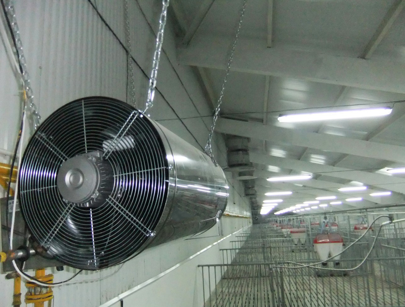 Sertés ól fűtő mobil, földgázos hőlégfúvó, függeszthető típus.